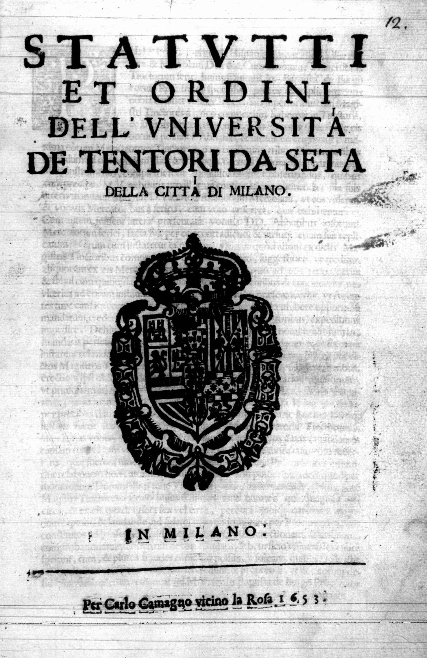 Frontespizio